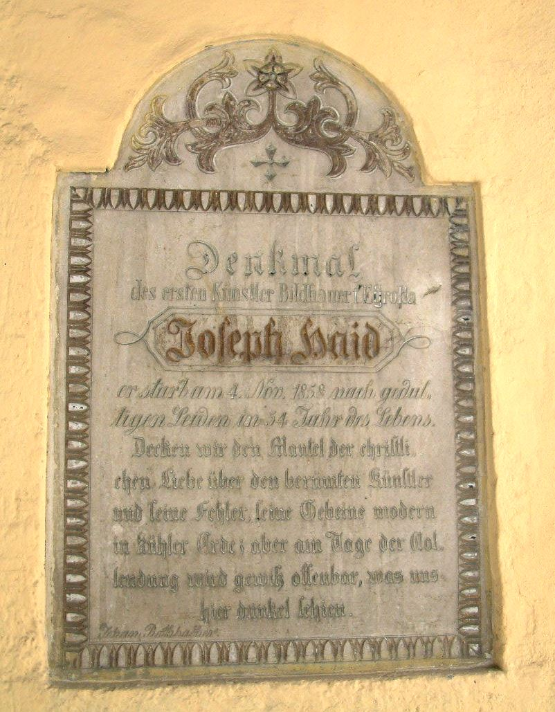 Grabstein des Bildhausers Joseph Haid (+ 1858) in St. Johann in Tirol